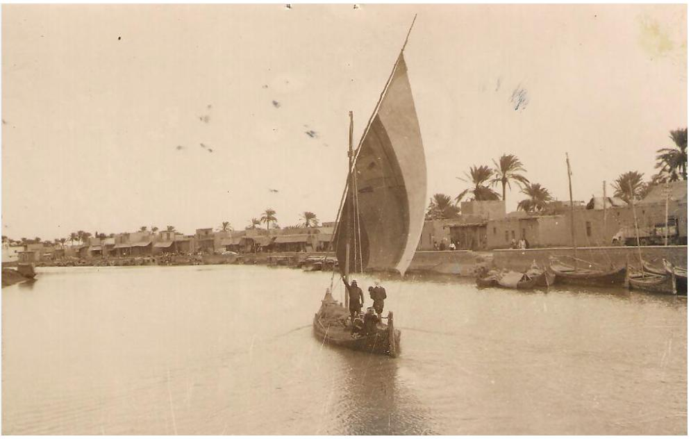 هذه صوره قديمه لنهر مدينه المجر الكبير